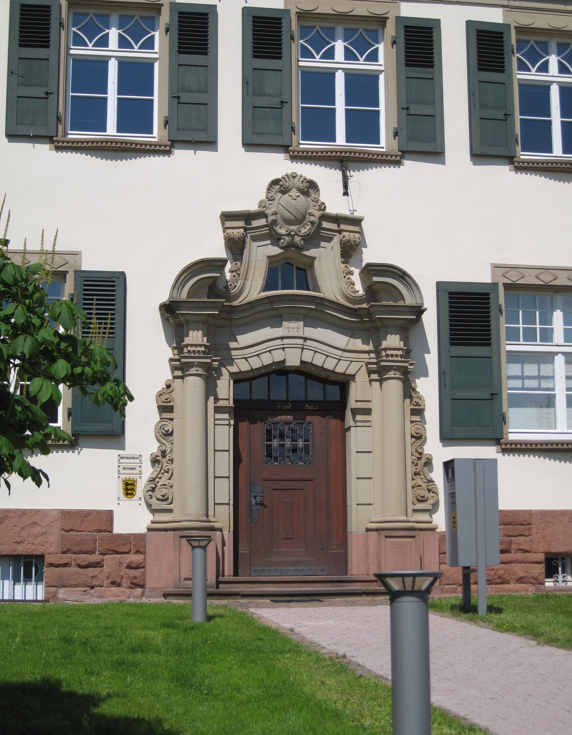 Amtsgericht Ettenheim, Otto-Stoelcker-Straße 8 in Ettenheim.